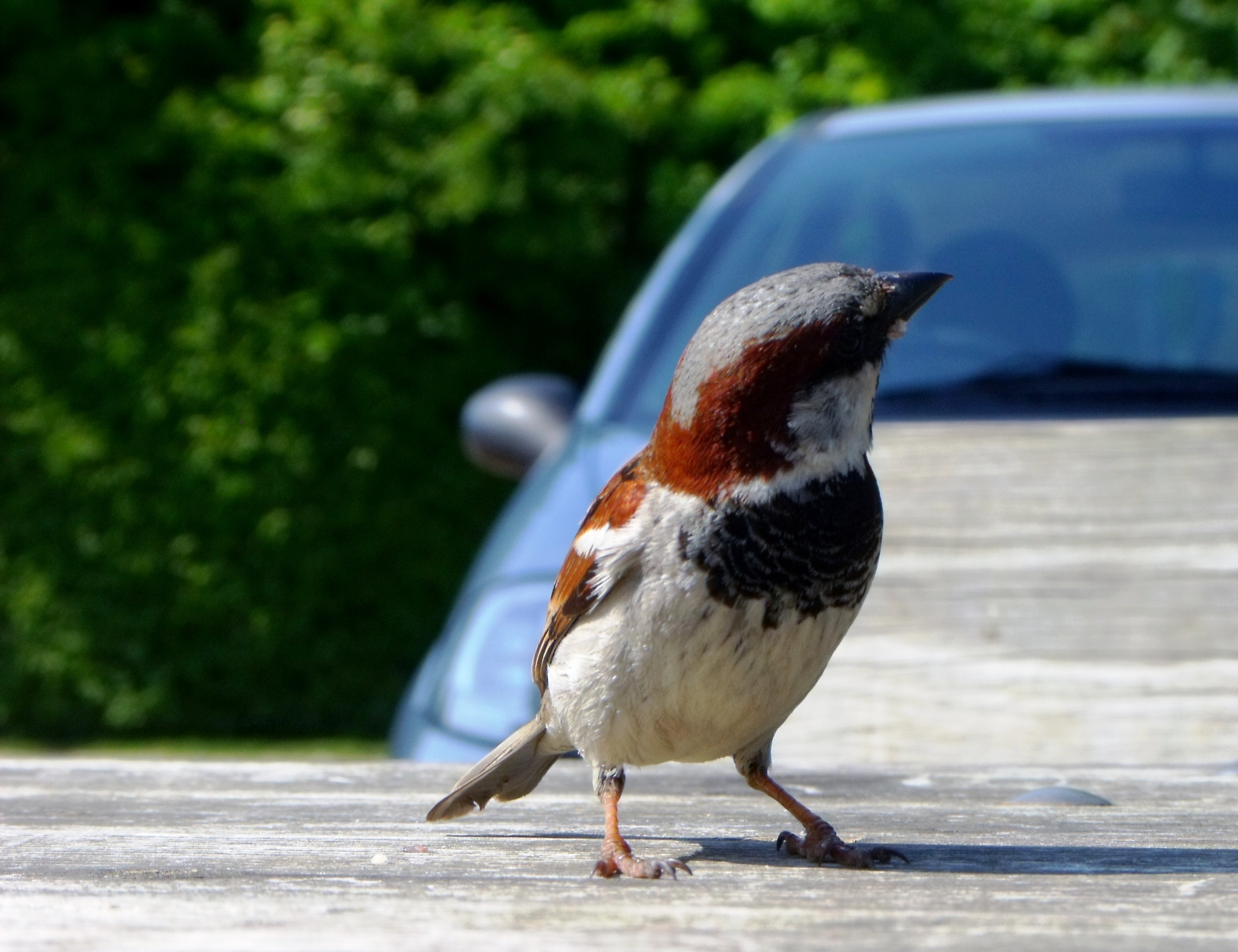 Male.